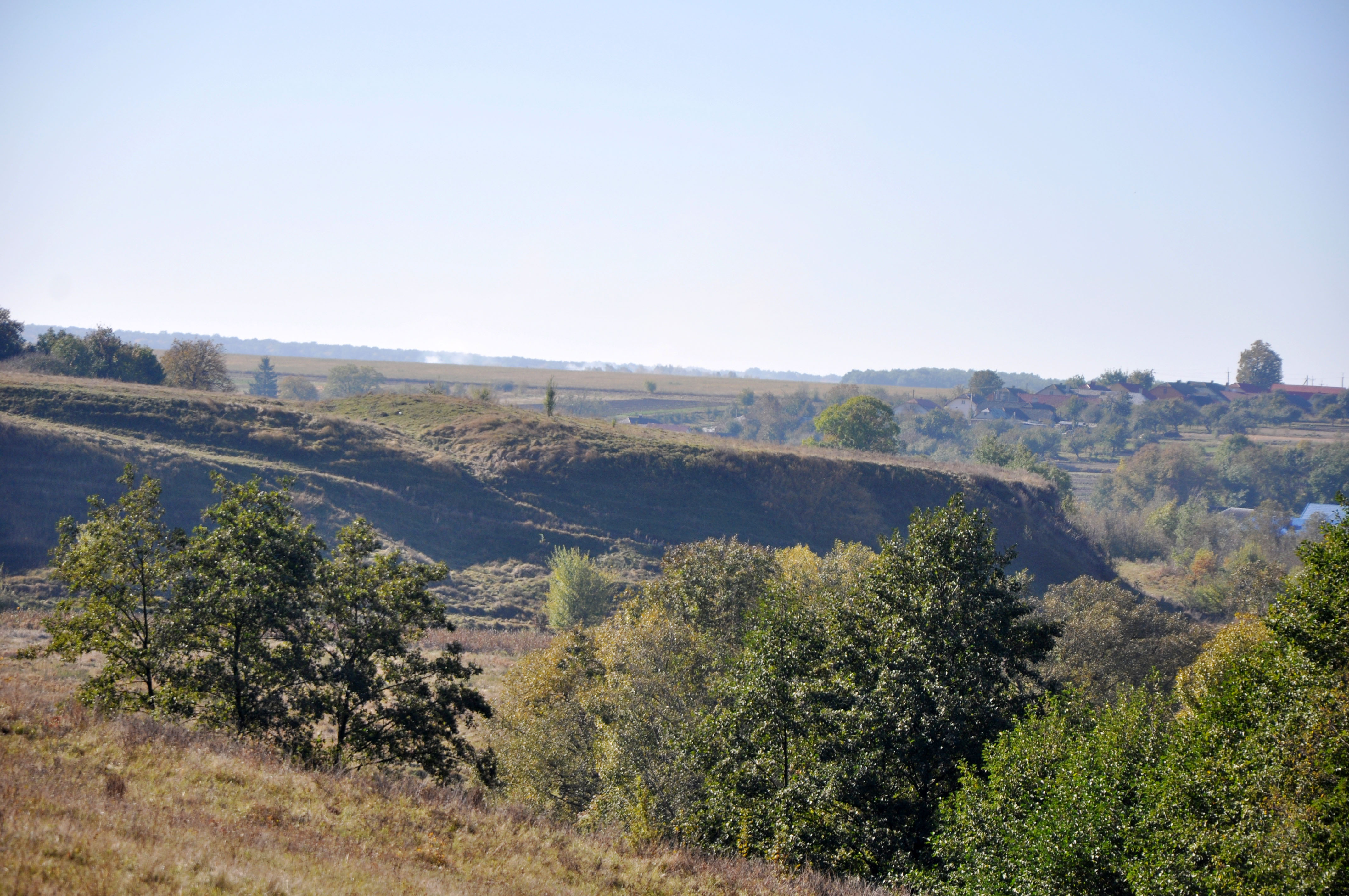 Шманьківський замок